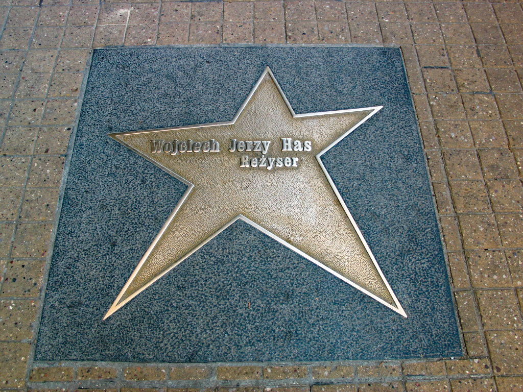 Łódź Walk of Fame - Wojciech Jerzy Has